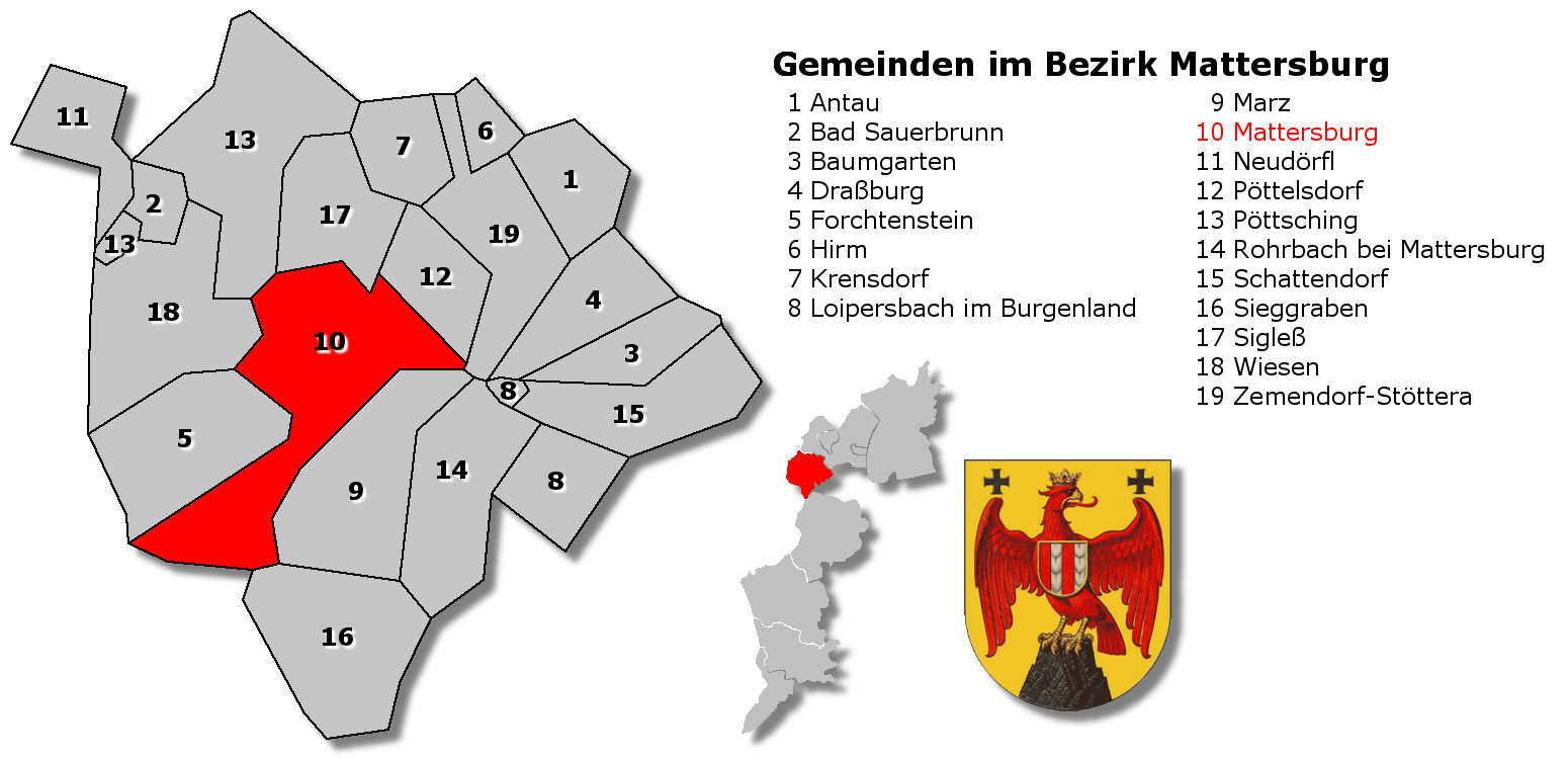 Gemeindekarte Bezirk Mattersburg (Burgenland, Österreich)